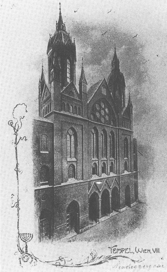 Synagoge Neudeggergasse in Wien-Josefstadt auf einer Postkarte um 1903